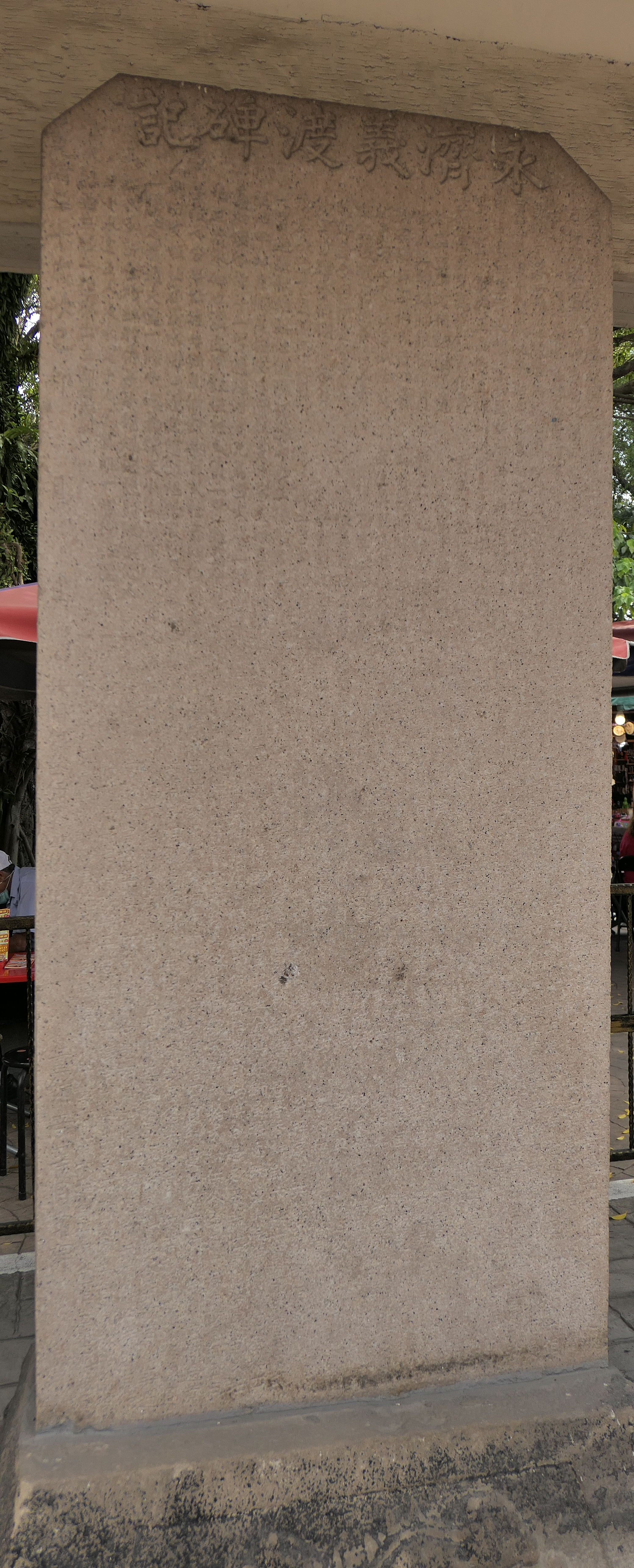 中文（台灣）: 位在竹山紫南宮旁的永濟義渡碑 永濟義渡碑記 碑文 蓋聞溱洧濟人，尚廣乘輿之惠；漢江漁父，猶高辭劍之風。況桑梓之鄉、澗溪之險，一水橫流，萬人病涉；苟不給值以償勞，誰肯刺舟以待客。如彰屬之沙連保濁水渡者，當內山南北溪流之衡，湍激漲急；加以春夏之間，久雨纏綿，山水暴至，溜急似箭、浪湧如飛，舵工稍一鬆手，即翻船觸石，凶占滅頂。論者謂：「臺灣一小天地，濁水之勢與黃河等。」非虛語也！ 董君郁文，家濁水之濱；深痛其事，嘗與化成董業師大經論興義渡。師勸而勉之，董君遂倡捐佛銀六佰員。時有吳君聯輝、陳君再裕等同心贊成，而董事遽逝，事遂中停。茲其令嗣鍾寄心存繼志、念切扶厄，再邀吳君朝陽等協力勸捐，共得銀弍仟八佰員買置義田十段，歲收子粒四百石，逐年完租納稅、給發工貲、修理船具。議定章程，臚列於左。 夫市義捐金，篙工不憂乏食；僱舵買棹，寶筏用渡迷津。利涉可占，自無望洋之嘆。將賓至如歸，盛德與溪流俱遠；碑傳不朽，嘉名共山水爭光，豈非跋涉行人所永恃以為利賴哉！爰為之誌其緣起，以勒諸石。 賞戴藍翎欽加五品銜直隸州州同己未科舉人簡化成拜撰。 捐題佛銀建立義渡諸芳名：臺鎮憲吳光亮捐銀弍佰員，鄉賓董郁文捐銀陸佰員，職員吳聯輝捐銀伍佰員，鄉賓陳梓都捐弍佰四員，職員陳再鑾壹百捌拾員，鄉賓張敬祠捐壹佰大員、藥郊金合興捐壹佰大員，鄉賓曾理養捐捌拾大員、鄉賓陳漂意捐捌拾大員；貢生林登榜叁拾捌員，蕭慶雲叁拾五員，貢生簡廷俊叁拾壹員、生員張炳煌叁拾壹員，武生吳朝良叁拾大員、陳震電叁拾大員，陳振英弍拾五員，劉時勤弍拾叁員、陳正吉弍拾叁員；鄉賓蔡大清弍拾員、陳冷泉弍拾員、職員莊鍾英弍拾員，黃聰亮拾五員，陳合成拾四員；舉人簡化成、恩貢生董啟章、貢生曾秉彝、藥舖陳存德、曾長春、張廷標、林瑞隆、林祈和、陳瑞奢，以上各拾弍員。黃慶豐、洪兆祥、陳宗知、鄉賓莊文蔚、監生吳上珍、兄弟莊和田、鹿港眾販商陳瑞祿、陳世祥、魏良樹、陳鼎興、吳倉育、陳隆盛、吳清福、曾振國、吳赤牛、陳文梓、吳新興、高江和、莊梓虔、巫會扁、莊如掇、洪其昌、莊深杭、陳佛送、吳老力、洪正春，以上各捐拾員。共銀弍仟捌佰員。 一、買過張秋幼、張仕儲、陳□、陳卯、吳正德船日三十日，價銀叁百弍拾員；納孤老院稅銀拾弍員，納林圮埔觀音亭香燈銀六員。 一、買過陳尚志田弍段四甲，址在獅尾堀庄后，價銀壹仟零弍拾五員，納供谷陸石陸斗。 一、買過陳維德、陳水池田三段五分，址在獅尾堀庄脚並山脚，價銀弍百壹拾四員，納供谷柒斗。 一、買過陳浩清兄弟田弍段五分九厘，址在獅尾堀庄前並后埔仔庄下，價銀弍佰叁拾捌員，納供谷壹石五斗。 一、買過黃水田弍坵，址在清水埤口溝邊，價銀伍拾弍員。 一、買過葉青山壹段壹甲柒分半，址在□仔寮庄脚路上路下，價銀弍百六拾弍，納供谷五石。 一、買過曾紅玉田壹段七分半，址在牛崎脚，價銀叁百弍拾員，納供谷五石。 一、買過陳能田四段，址在咬狗坑內杭邊，價銀伍拾四員，納連興宮香燈銀五角。 一、買過黃水田弍坵，址在清水埤口溝邊，價銀伍拾弍員，納遲興宮租銀弍角。 共開勒碑銀壹佰員，共開築船寮銀壹百六拾員，共往稅契銀弍佰壹員。 一、議定：義渡夫連一條小港義筏夫（小水即鋪橋），全年計共給發租谷弍佰六拾四石為工貲、火食，並七月普祭陰光諸費。不許取客財物；吉凶事過船，只小許金灼、紅羽。舟子不循規矩，隨時改換他人。 一、義定：過客身體物件，當自謹慎；不可自墜水中，誣賴舟子。 一、議定：船夫撐船，卯時起、申時止；小水定五人、大水定十人。尾載雖一，當撐他過去。 一、議定：急除礙船之石；船若礙破，舟子造賠。 一、議定：不肖子弟竊取船寮器具，偷放船、偷撐船並生事，一經察出，立即重罰。 一、議定：木水自當顧船；被漂流，舟子造賠。 開中人、代書、知見銀六拾八員，找先、入稟、存案銀金拾玖員，總合共開銀叁仟零四拾員。 光緒五年歲次己卯 月 日，董鍾奇等同立碑